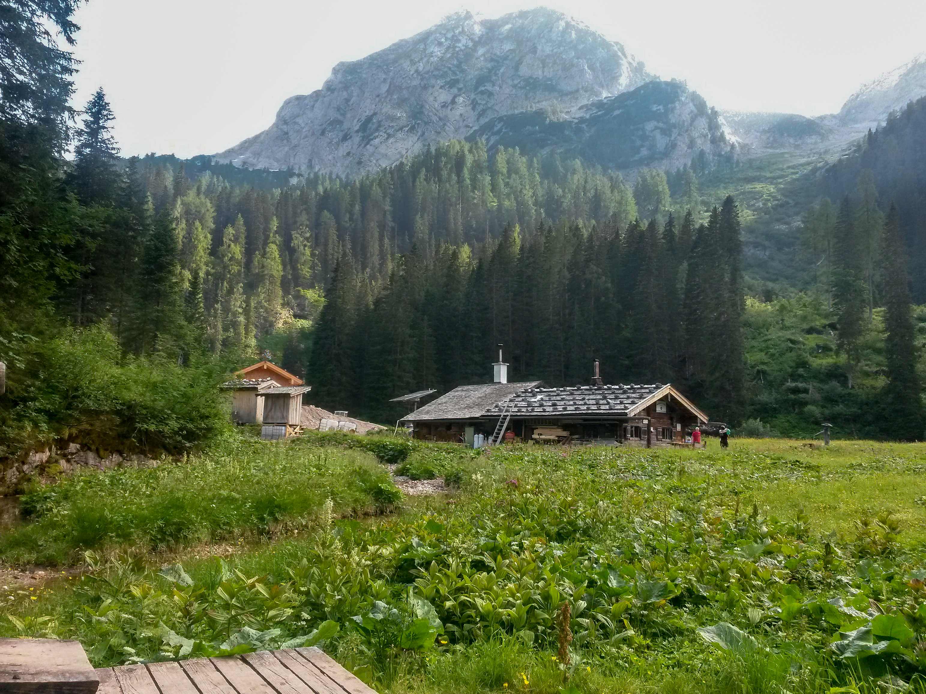 Blick vom Röthbach zur Wasseralm (von Norden), im Hintergrund das Hocheck.